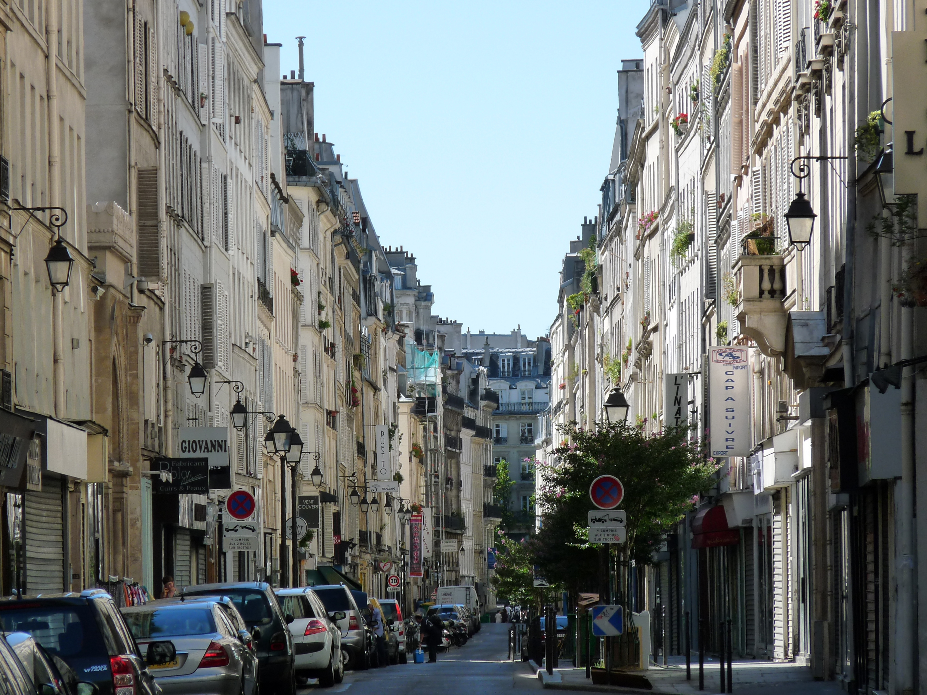 La rue Notre de Nazareth à Paris, vue de la rue du Temple.